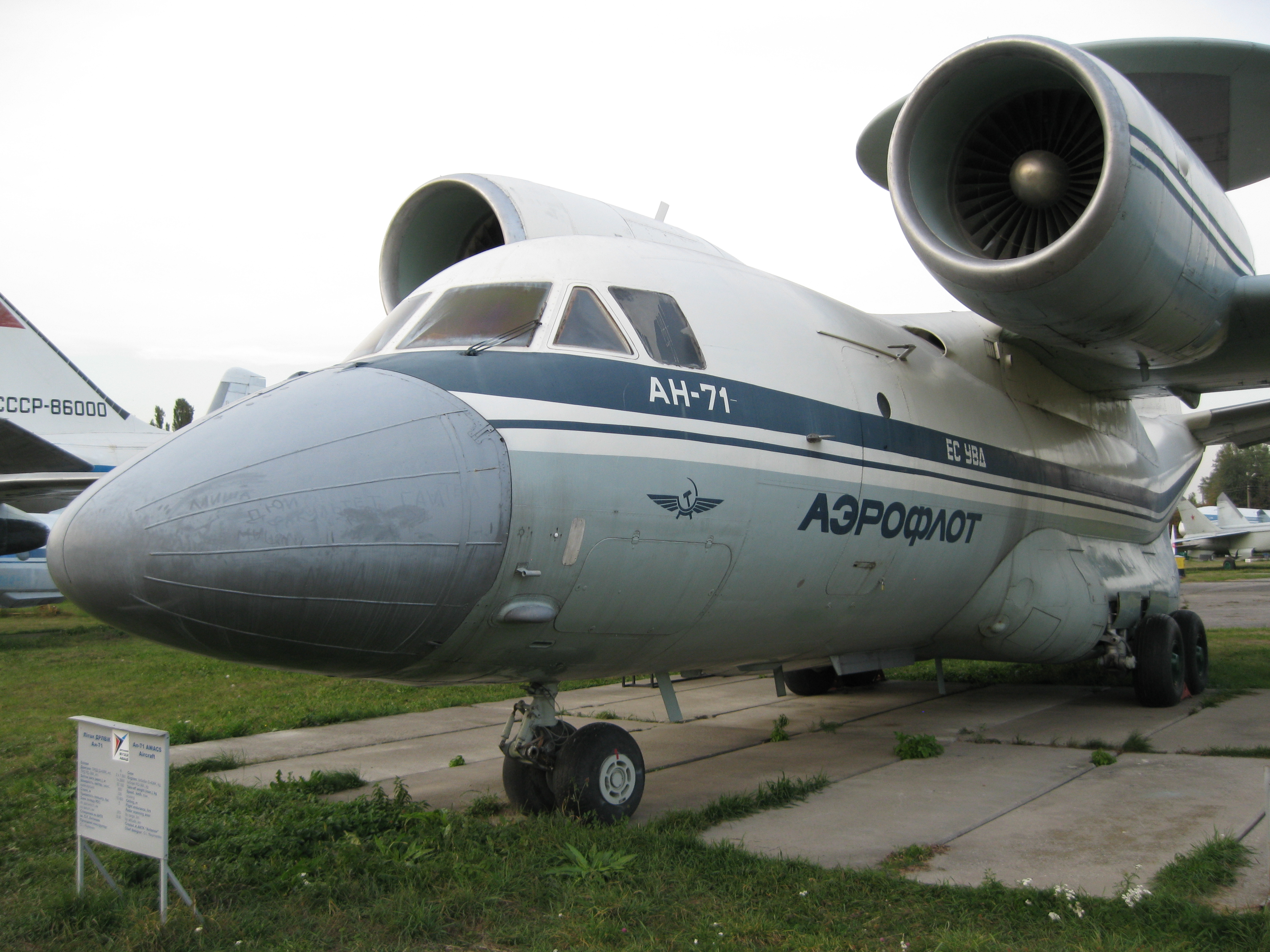 Музей авиации, г. Киев